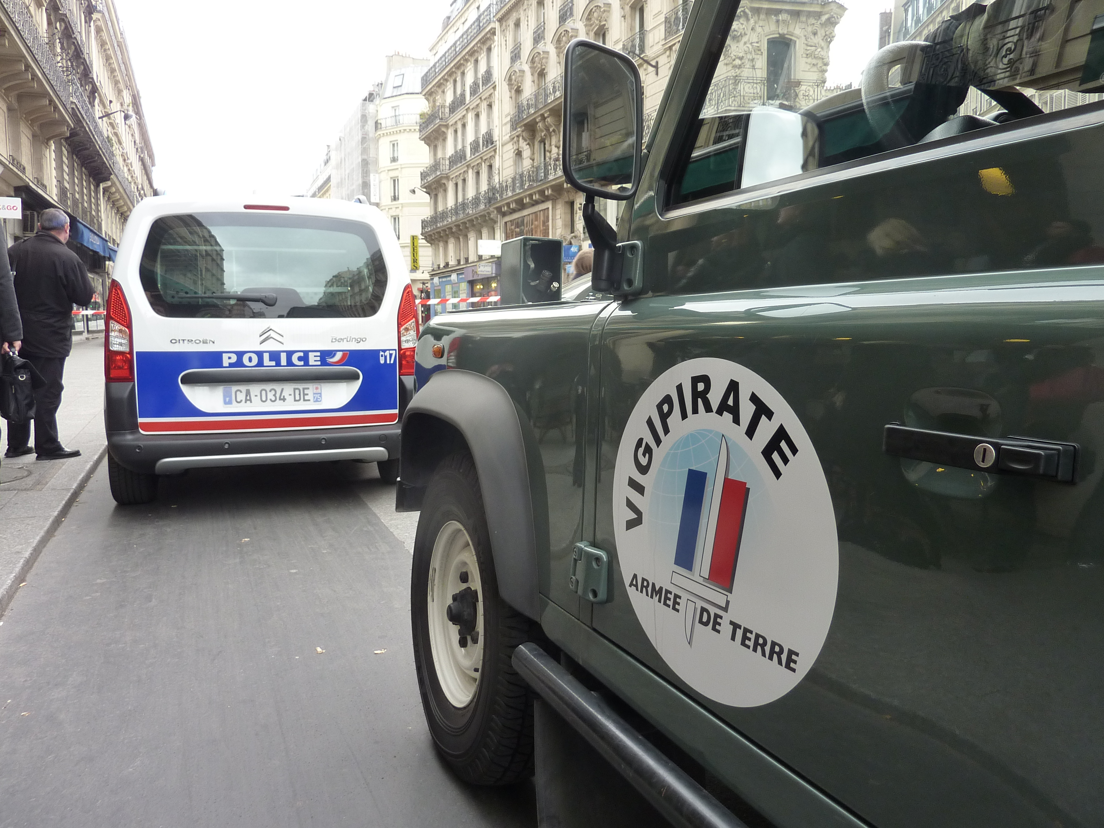 Au premier plan : véhicule de l'armée du terre Au second plan : véhicule de la police nationale